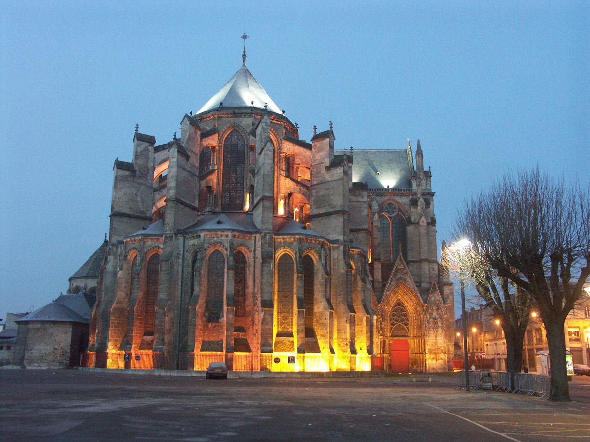 Cathédrale Saint-Gervais-et-Saint-Protais de Soissons, France - East end (Chevet)